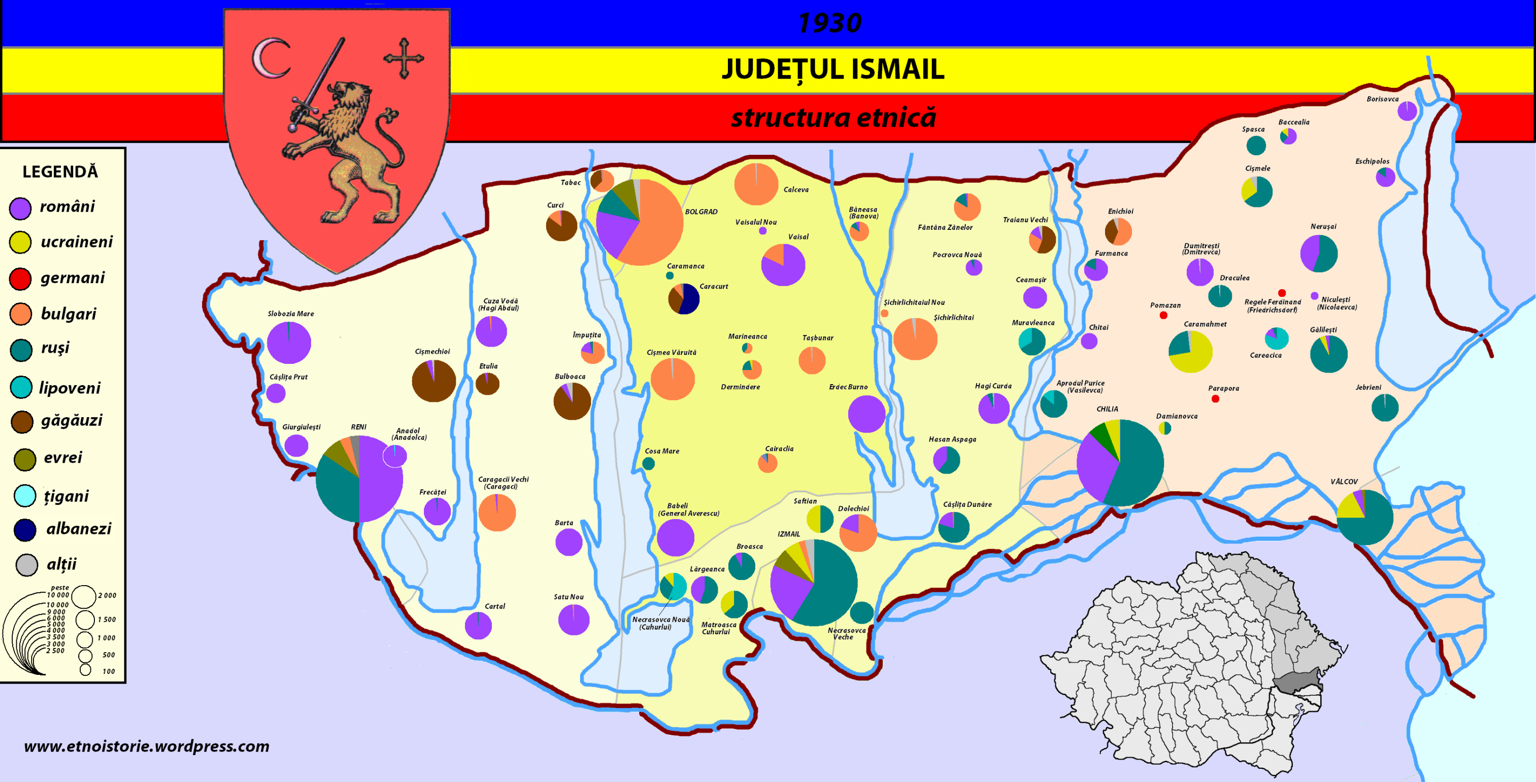 Structura etnică a judeţului Ismail (1930)